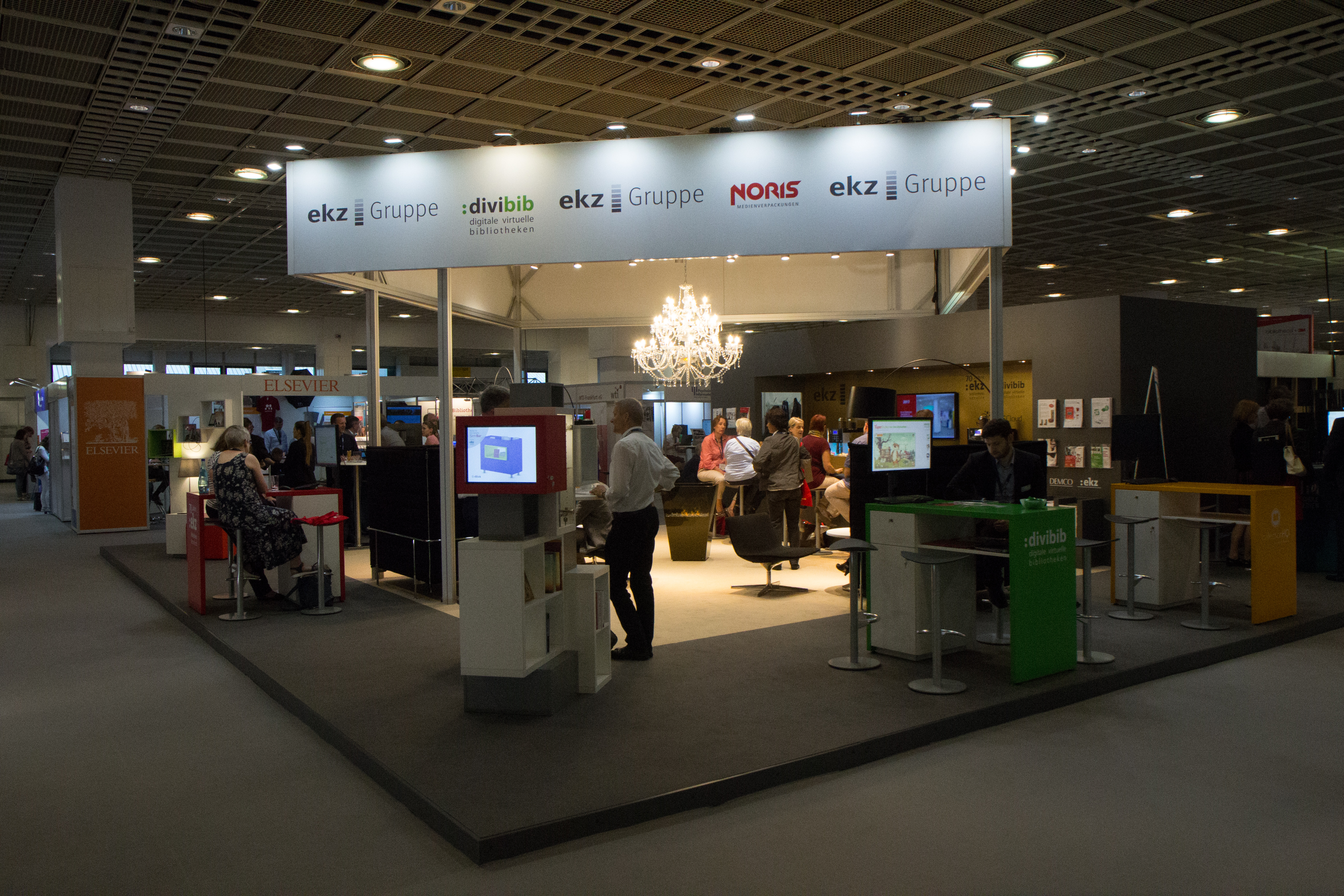 106. Deutscher Bibliothekartag in Frankfurt/Main